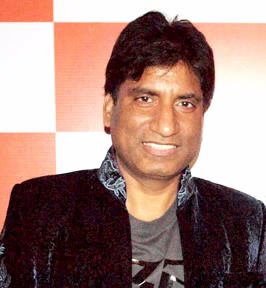 Raju Srivastav at 19th Sur Aradhna Award in Delhi